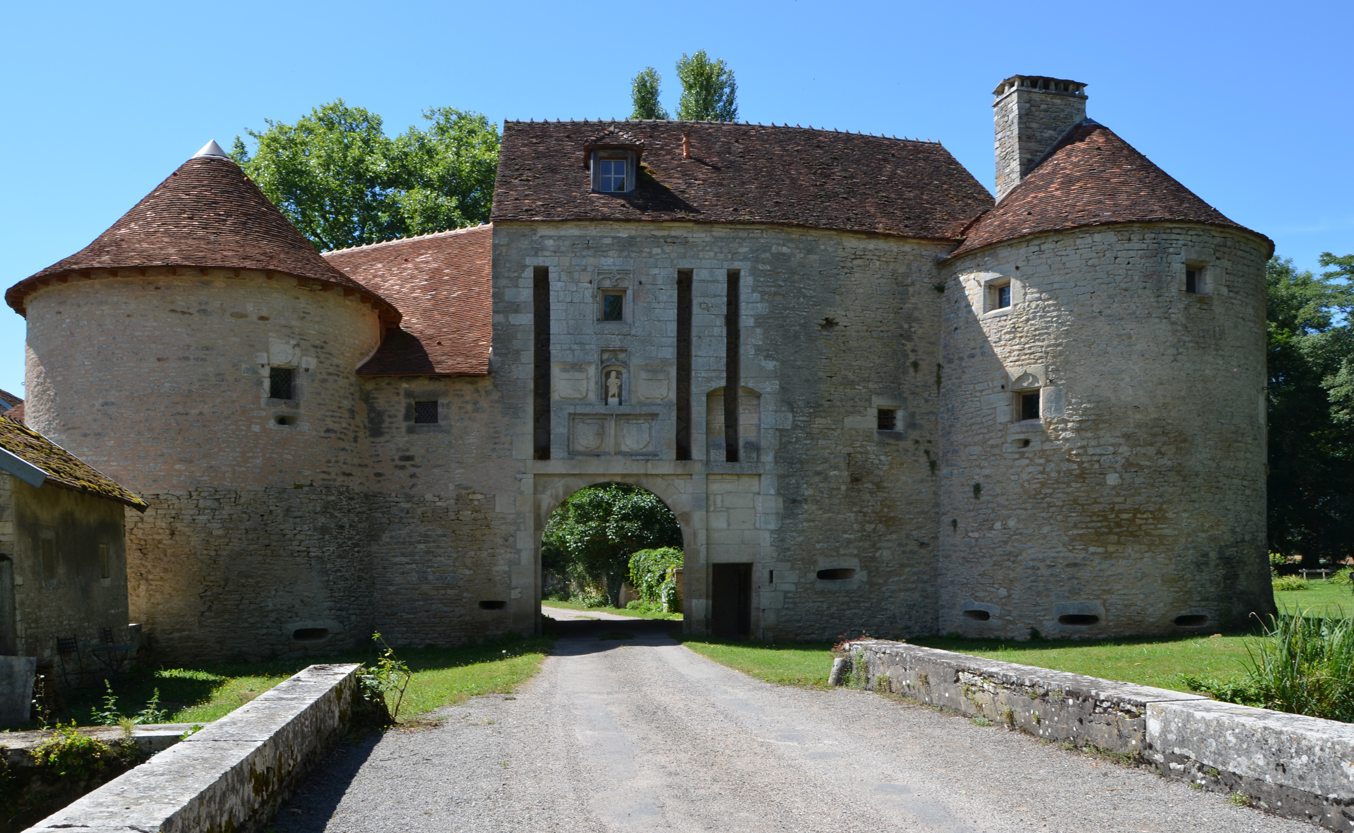 Commanderie de la Romagne, Côte d'Or, Bourgogne, France .